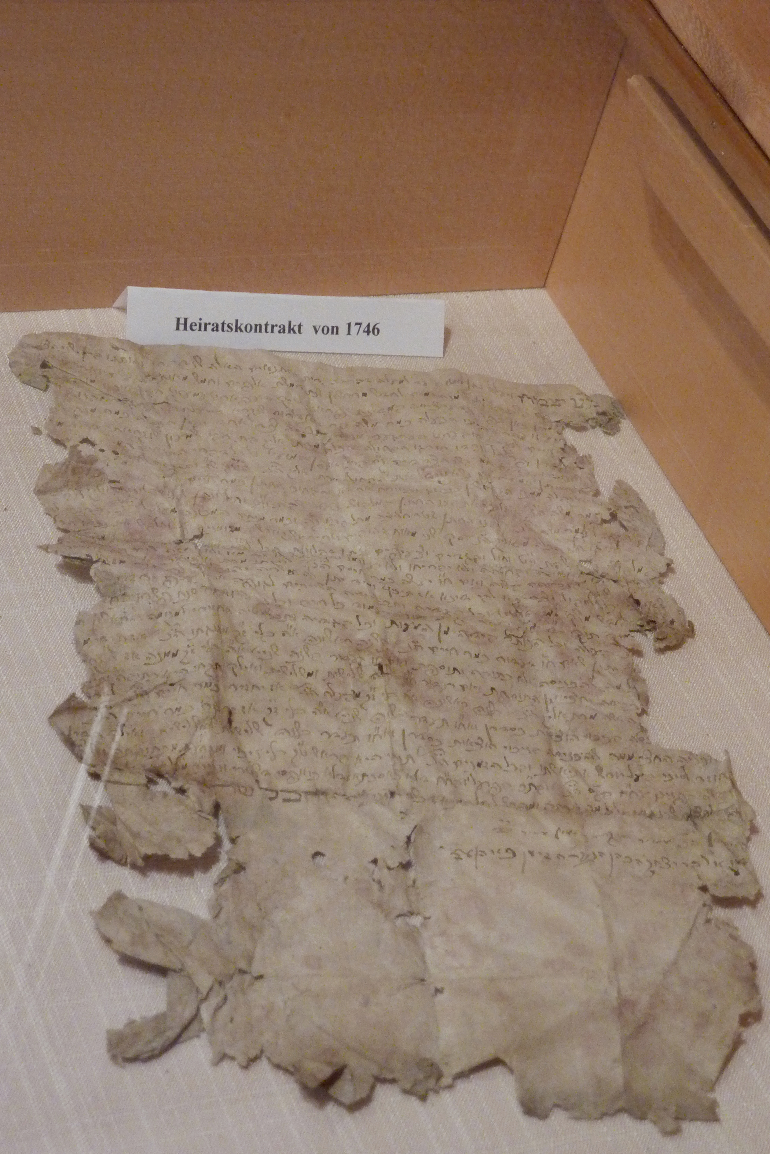 Genisa Niederzissen, Ausstellung in der ehemaligen Synagoge in Niederzissen im Landkreis Ahrweiler (Rheinland-Pfalz), Ehekontrakt von 1746